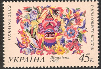 Поштова марка України 2002 з роботою Ганни Собачко-Шостак "Шпаківня"